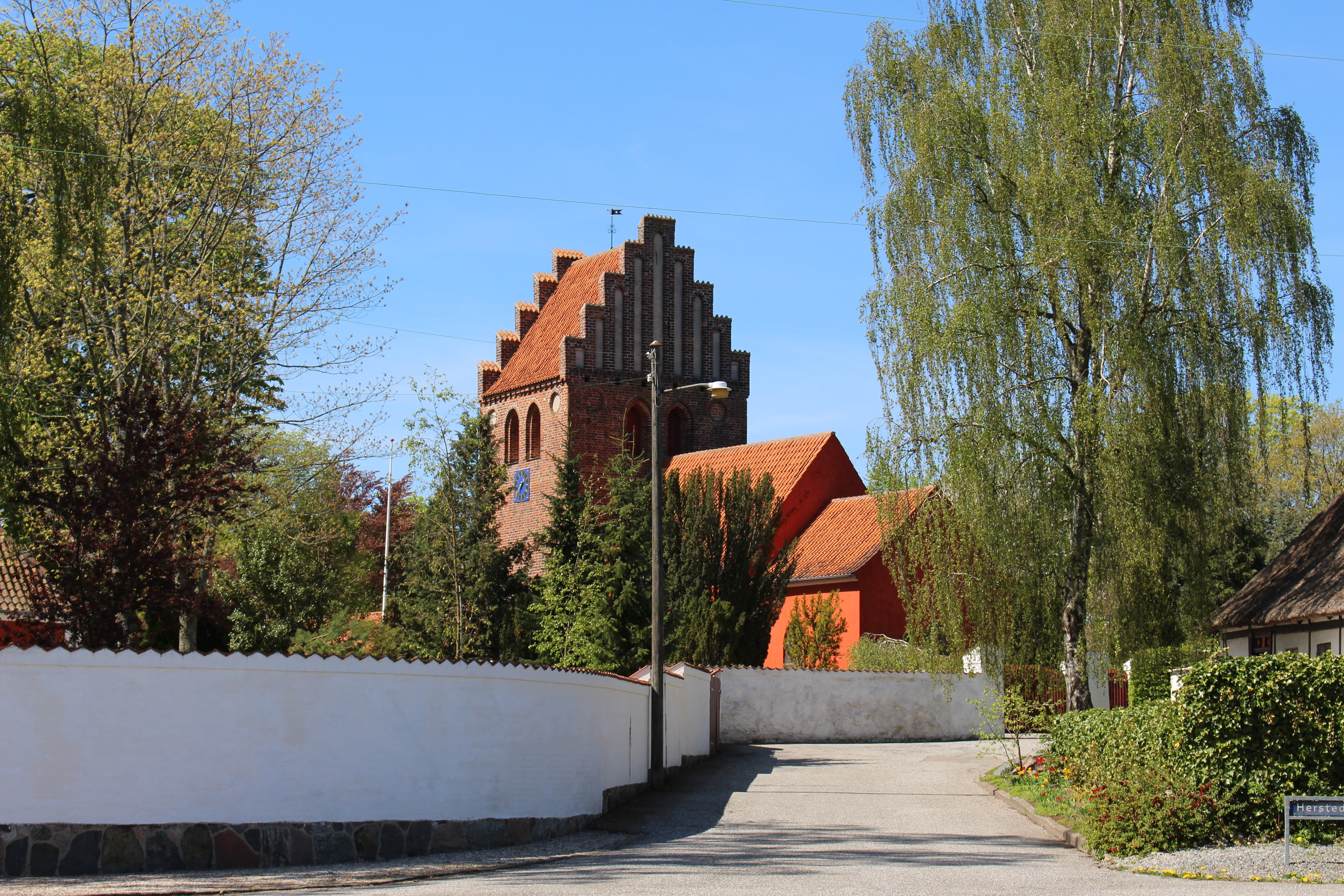 Herstedøster Kirke